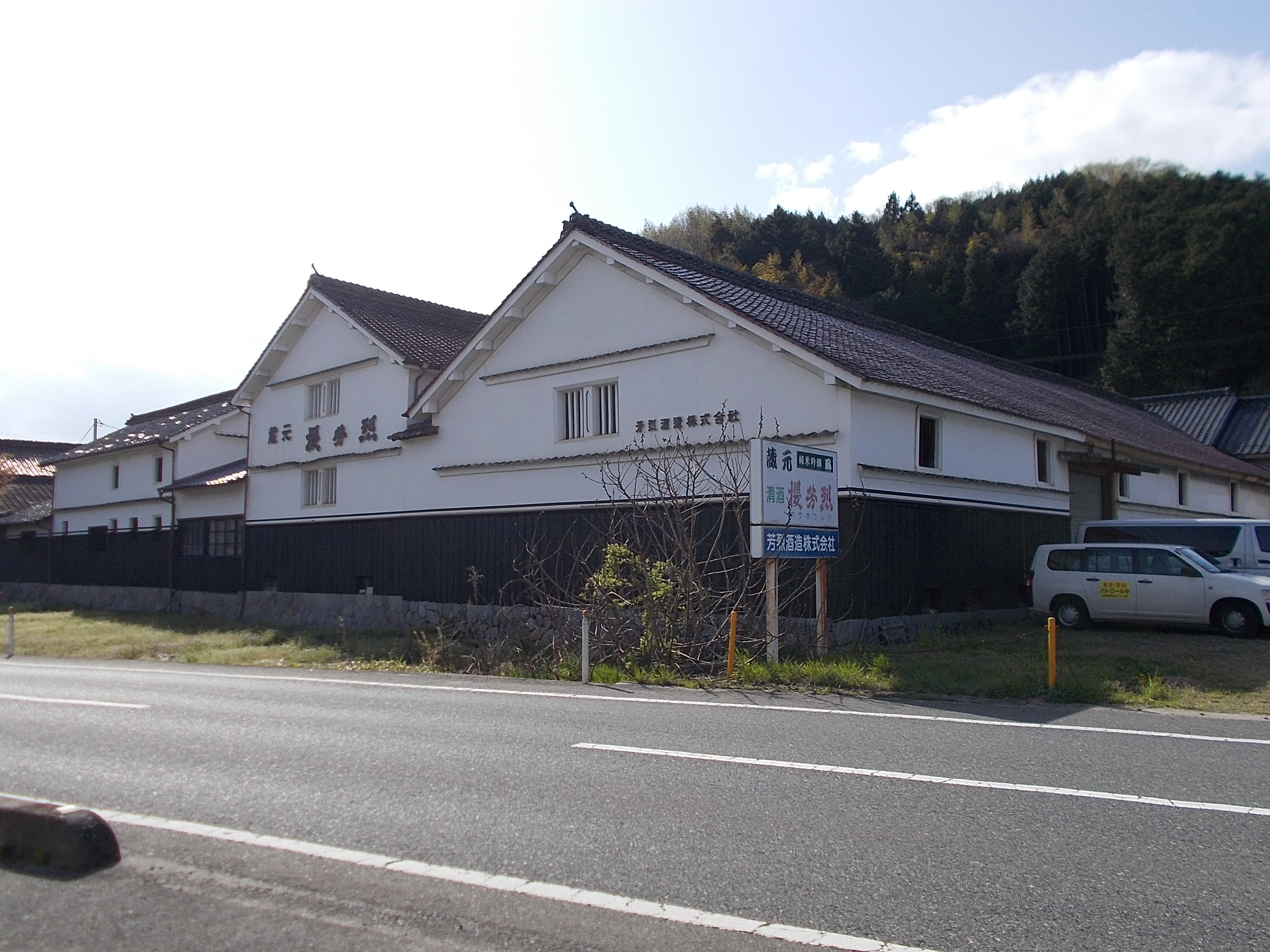 芳烈酒造酒蔵